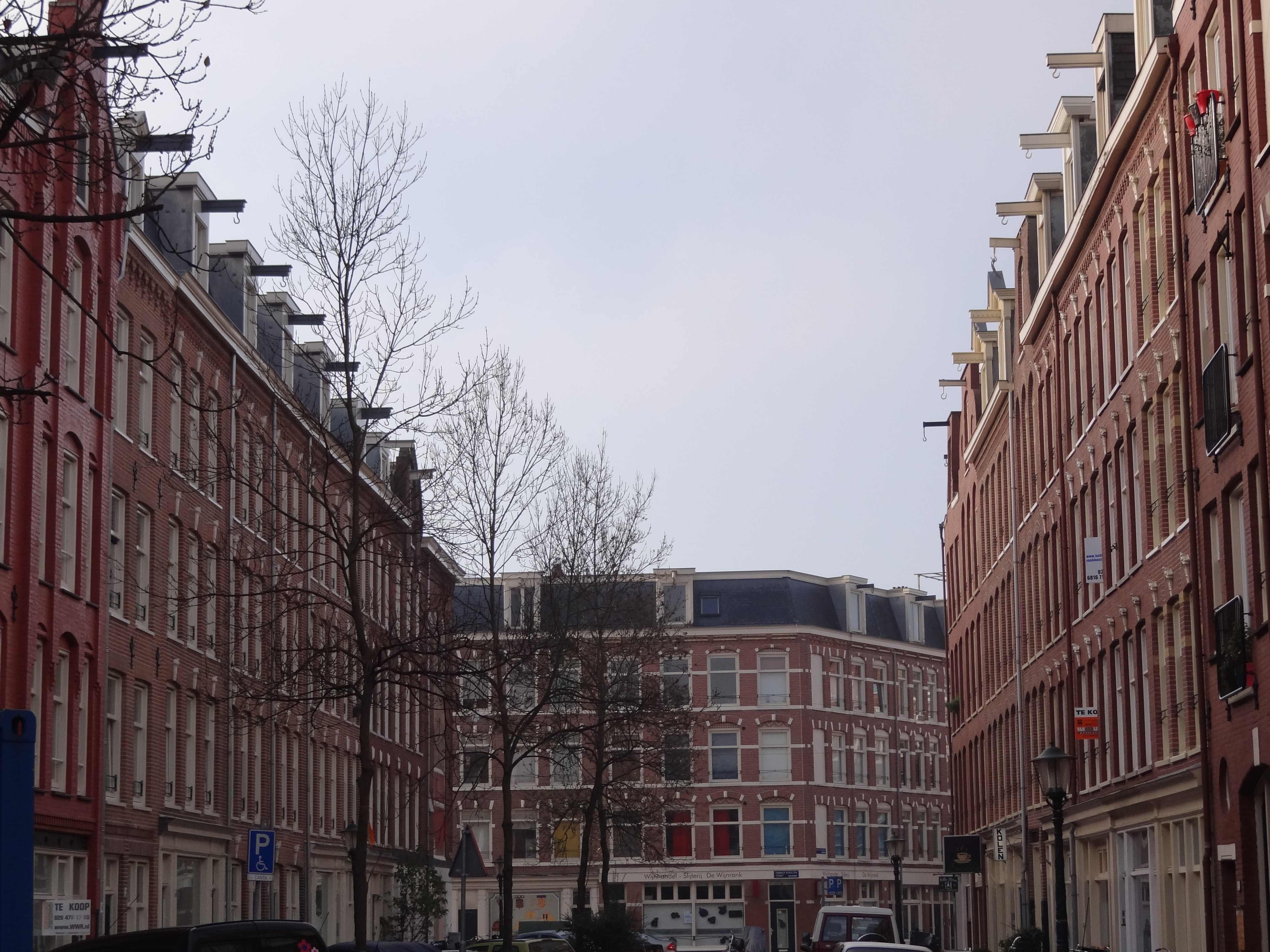 Streets in Amsterdam Bentinckstraat Amsterdam